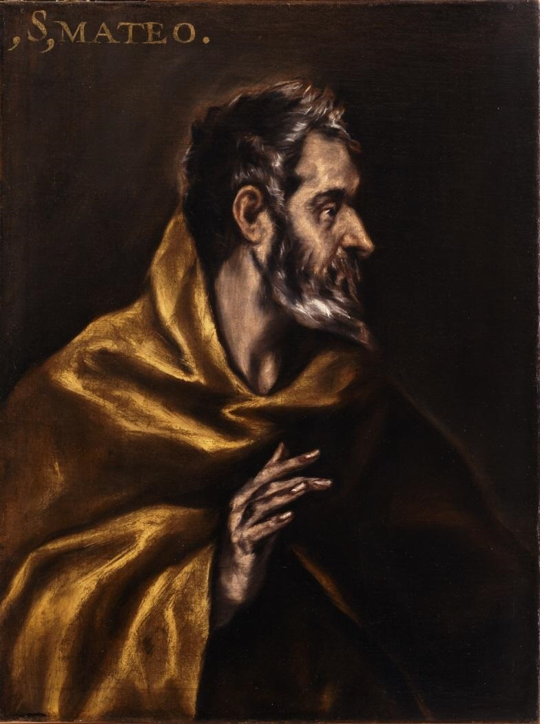 La obra representa al apóstol San Felipe, según la mayoría de los historiadores, aunque erróneamente se creyó en el pasado que tal vez representara al apóstol San Mateo.